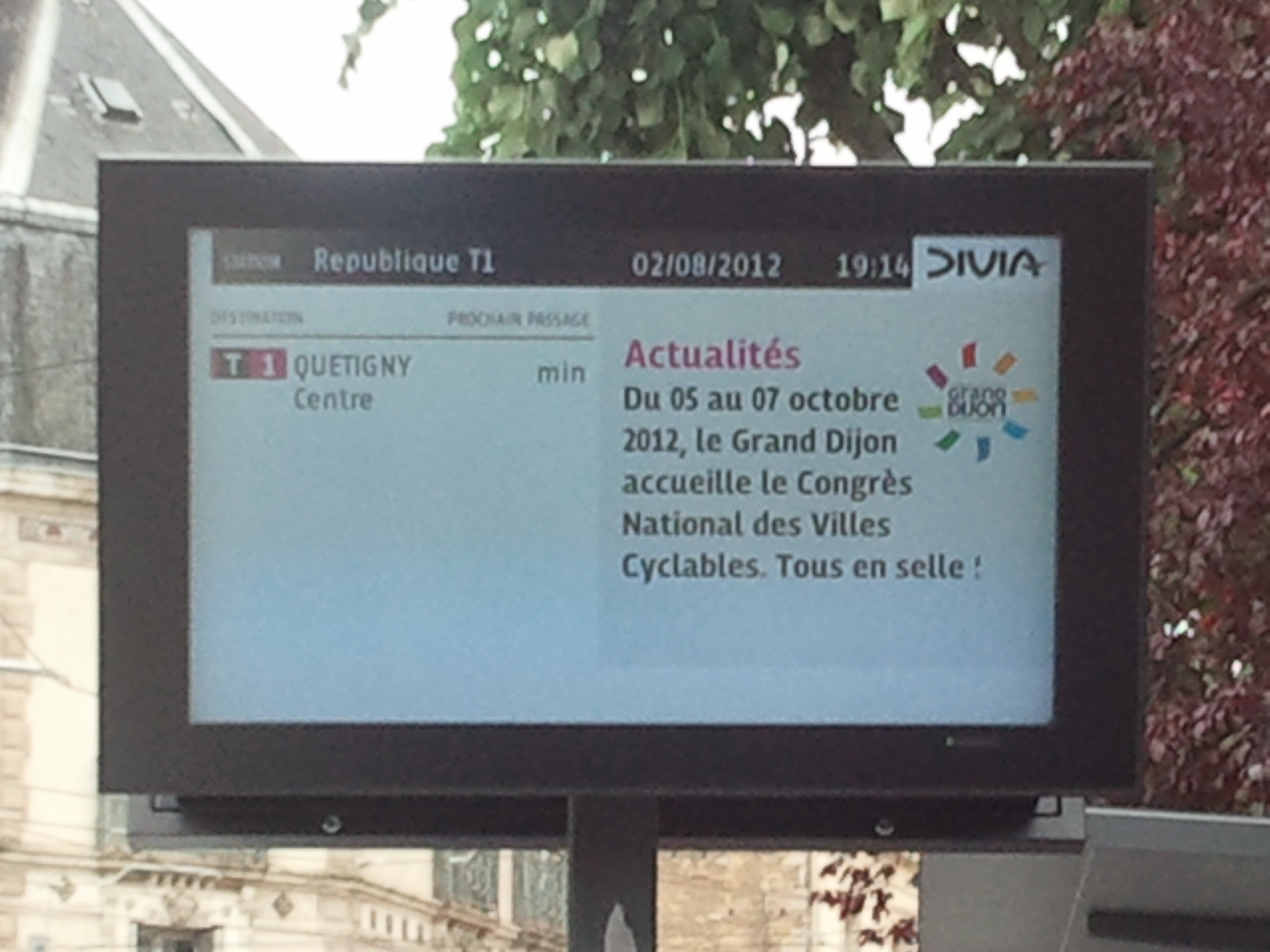 Tramway de Dijon - Ecran du système d'informations voyageurs, pendant le rodage de la ligne 1 (Station République T1)